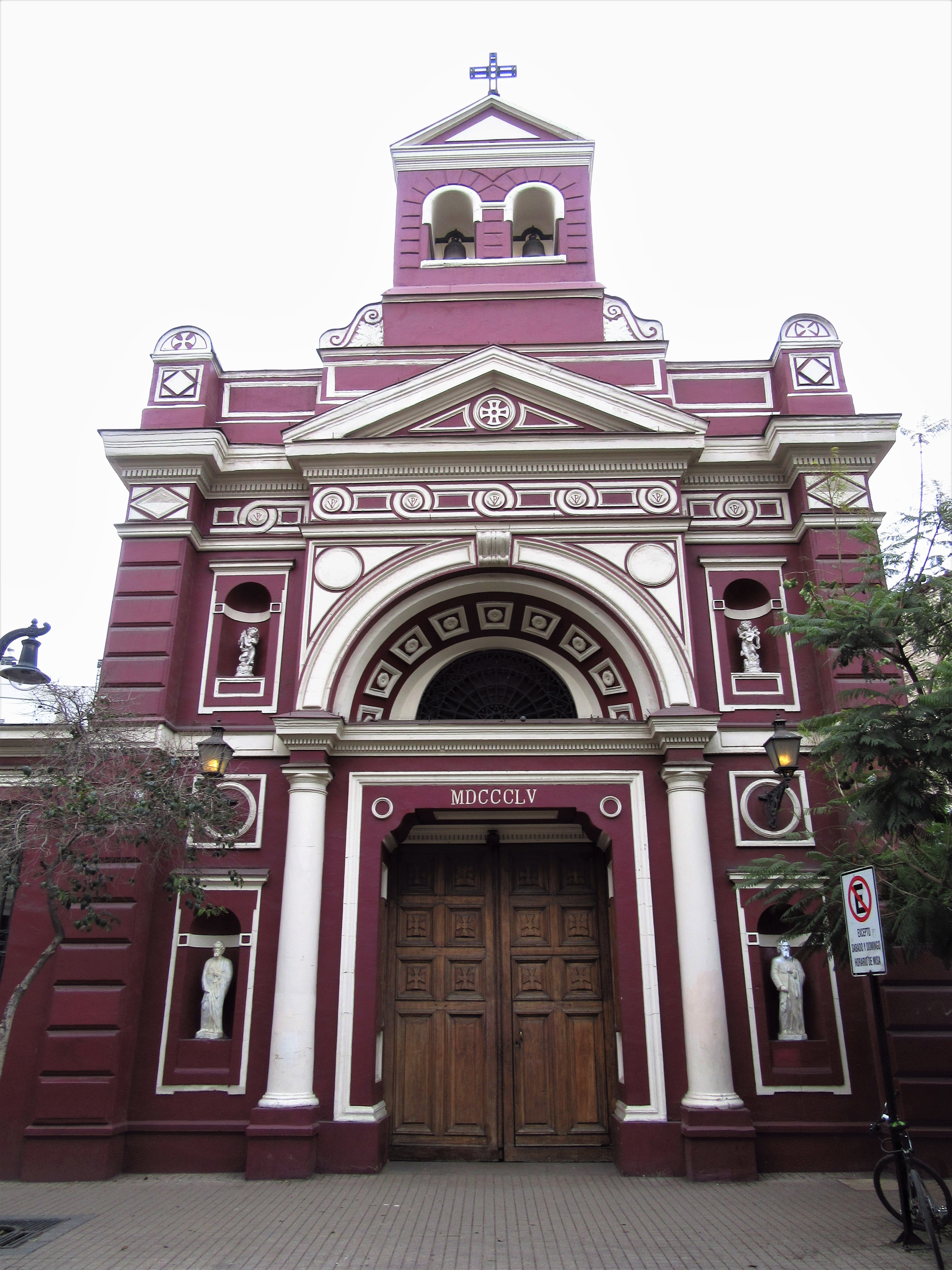 Iglesia de la Vera Cruz en el Barrio Lastarria.